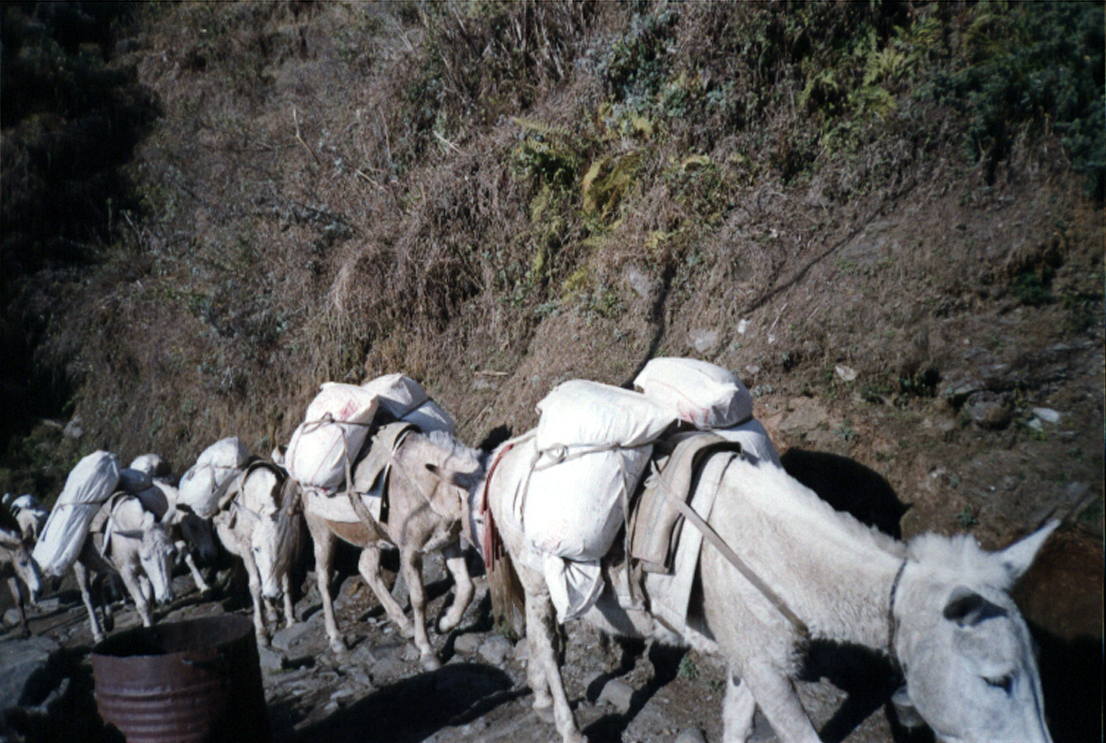 caravane de mulets bâtés 马帮